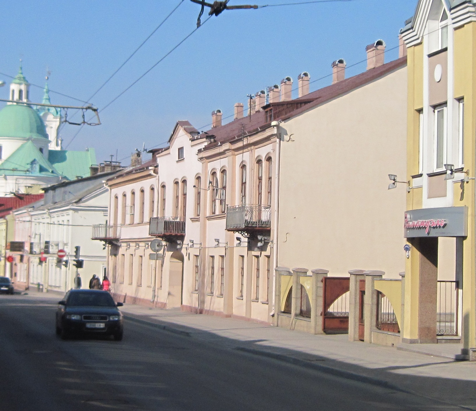 Забудова гістарычнага цэнтра Гродна. Вуліца К. Маркса, 14.